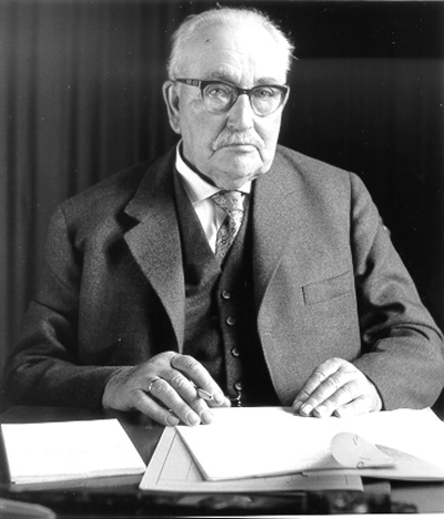 Carl Wilhelm Kaisen (1887–1979). 1945–1965 Bürgermeister von Bremen